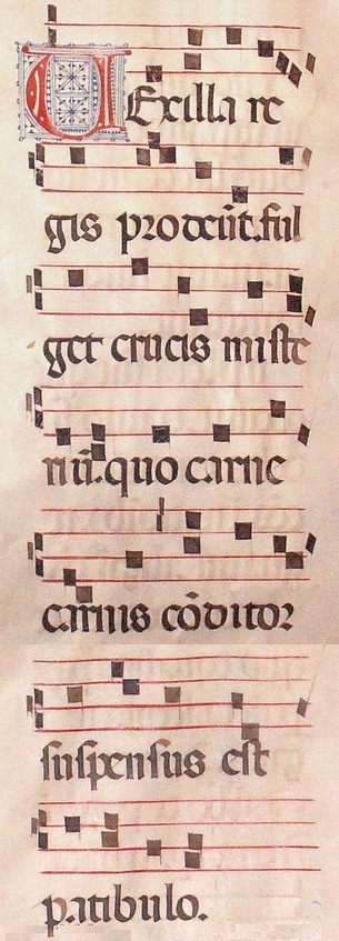 Venantii Fortunati hymnus Vexilla Regis prodeunt, scriptus Italia circa annum MCDX